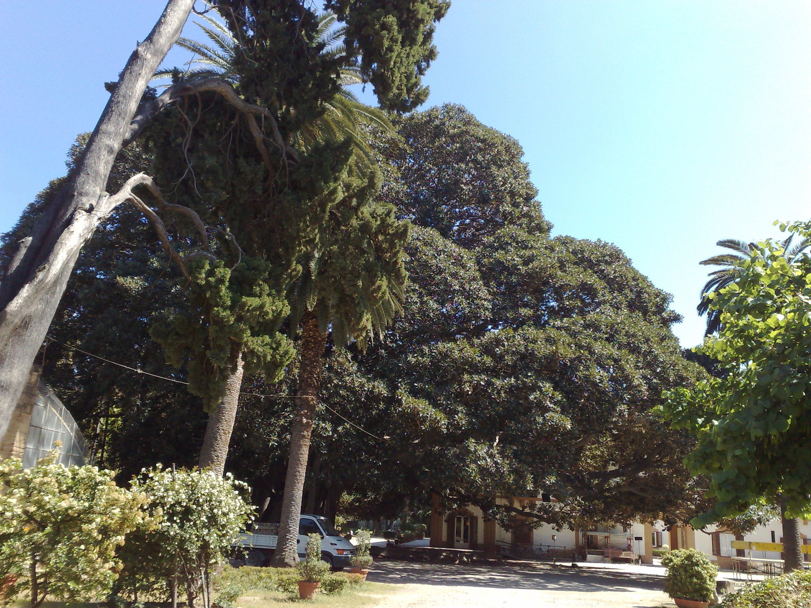 Villa Trabia, Ficus magnolioides